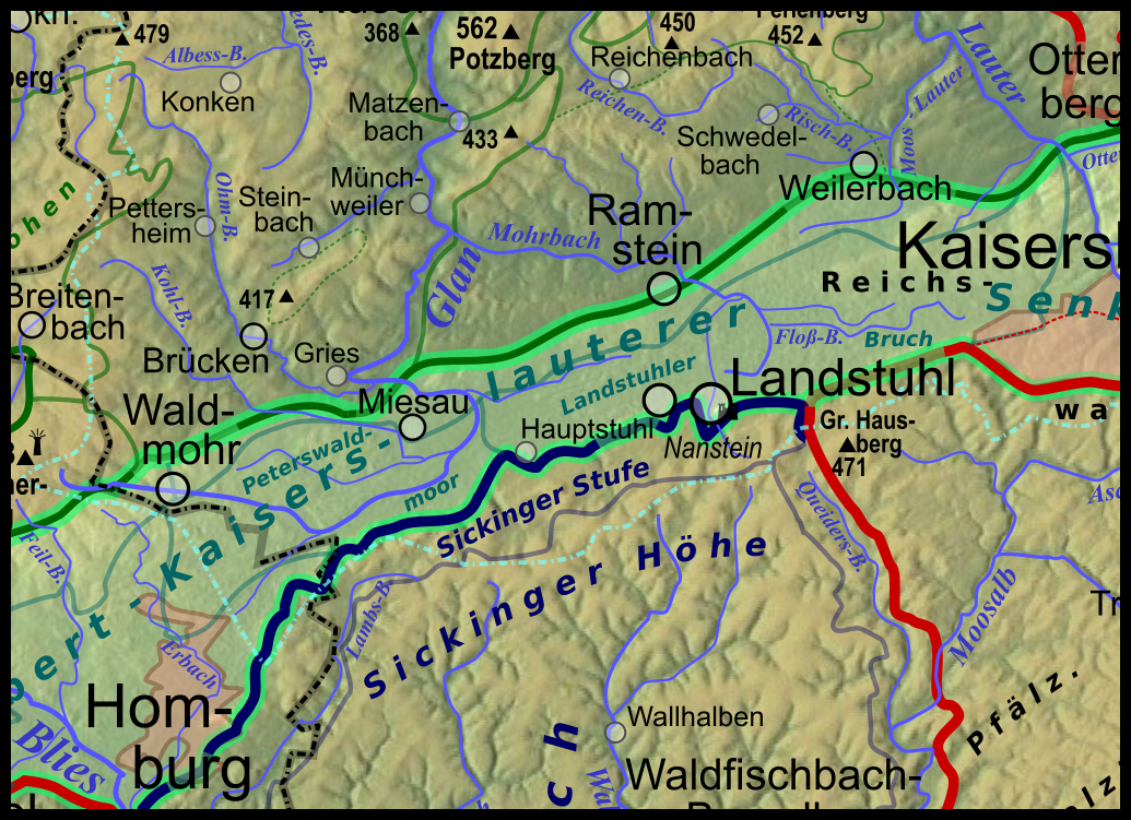 Naturräumliche Karte des Mittelteils der St. Ingbert-Kaiserslauterer Senke